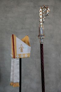 Arkkipiispan hiippa ja sauva